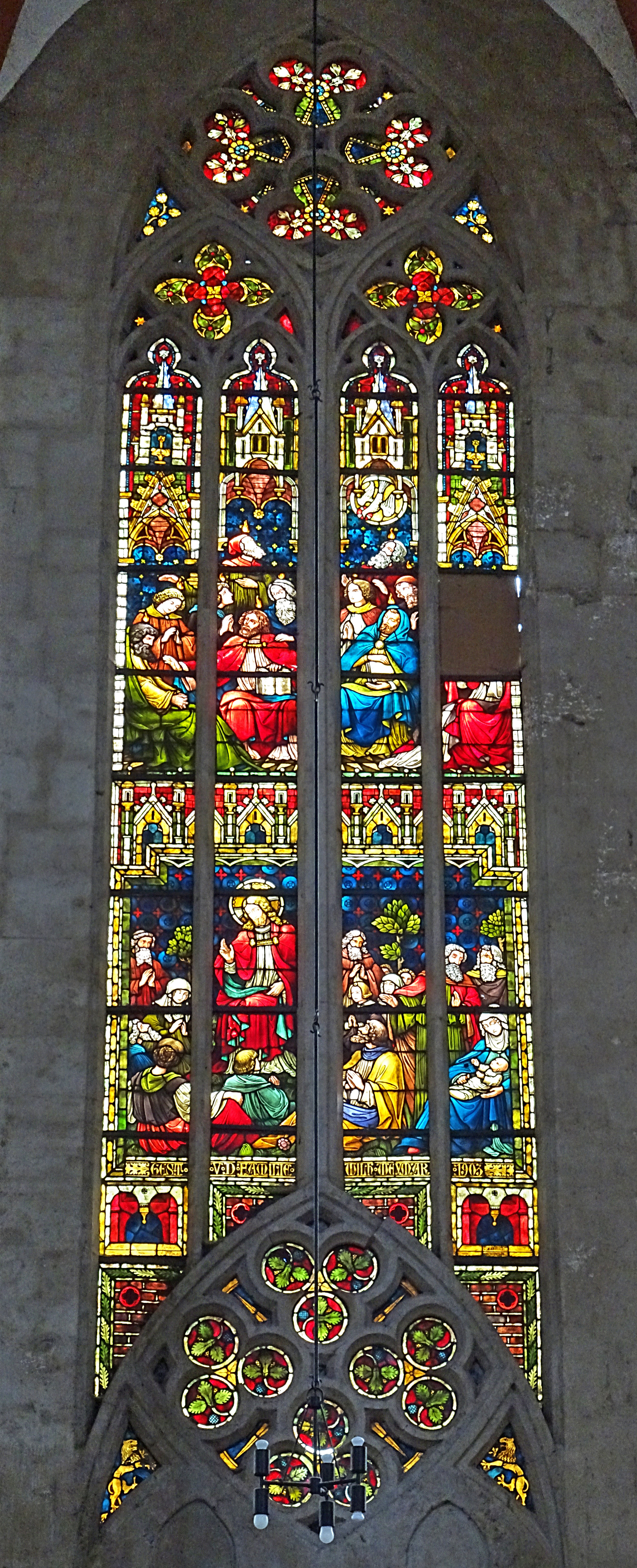 Buntglasfenster im Langhaus der Divi-Blasii-Kirche (Mühlhausen, Thüringen)